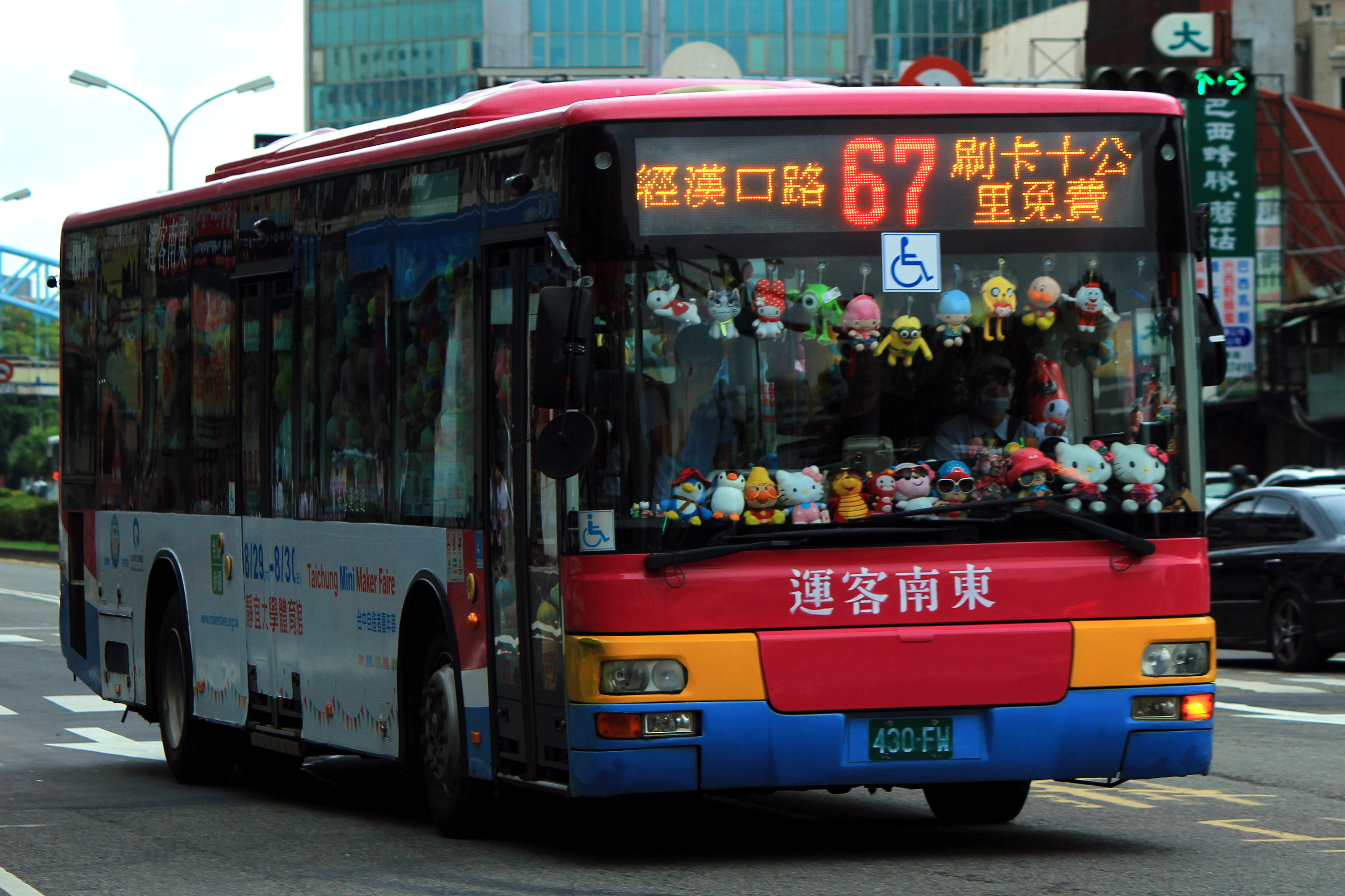 中文（台灣）: 東南客運宇通ZK6128HG低地板公車430-FW行駛臺中市公車67線。